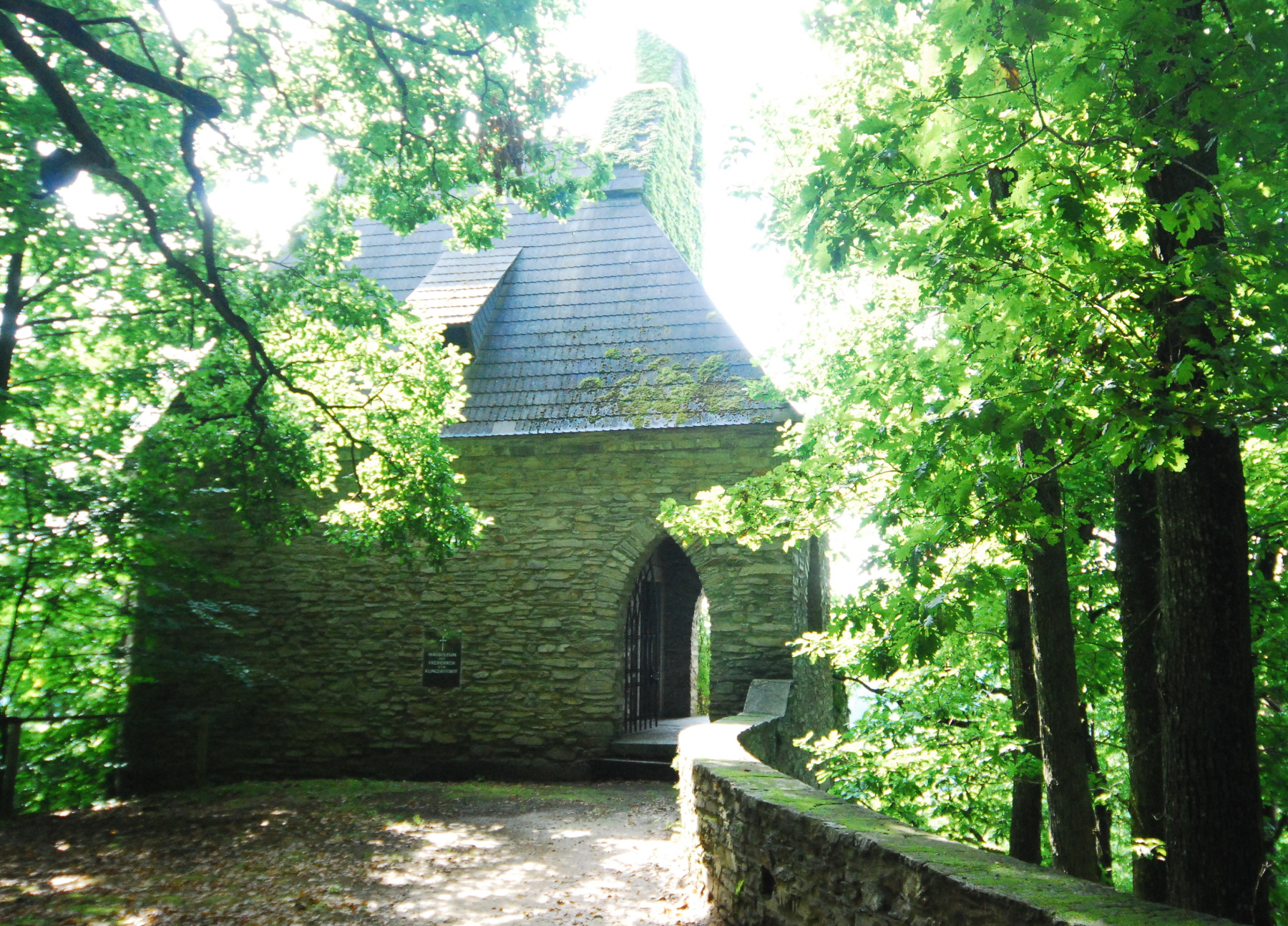 Mausoleum der Freiherren von Klingerstorff bei Raabs an der Thaya